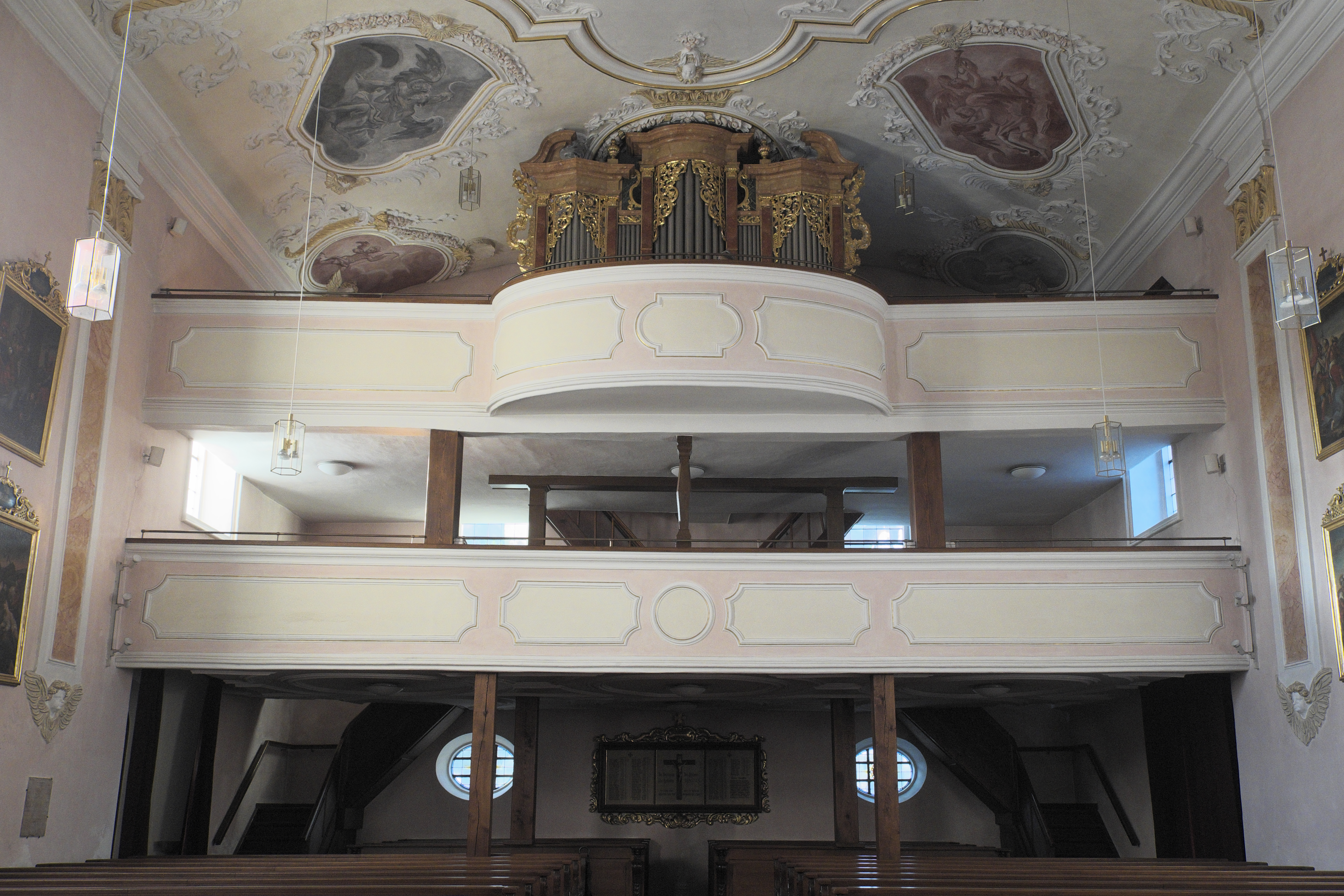 Katholische Pfarrkirche St. Vitus in Au in der Hallertau im Landkreis Freising (Bayern/Deutschland), Doppelempore